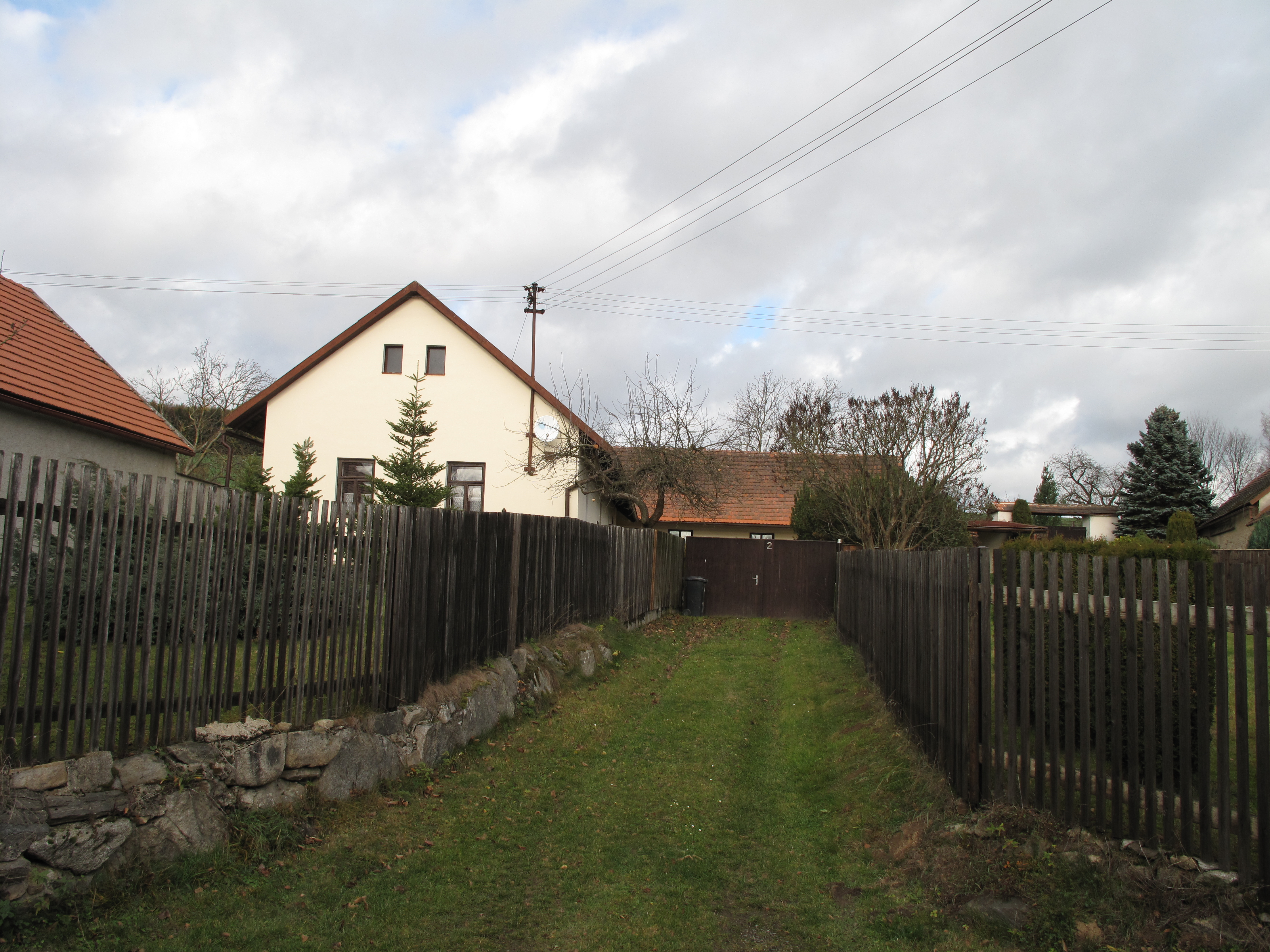 Plot v Žibkově. Okres Benešov, Česká republika.